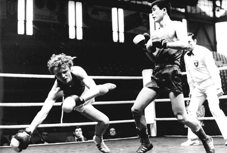 Andreas Schink, Jo Jong Gu ADN-ZB Lehmann 26.3.80 Halle: IX. Internationales Boxturnier um den Chemiepokal - Erster Höhepunkt war der Auftritt von Jo Jong Gu (KDVR, r.), Olympiasieger von 1976 in Bantamgewicht. Gu wurde nur 3:2-Gewinner gegen Andreas Schink (Wismut Gera), der dem Koreaner trotz des unglücklichen "Ausrutschers" zu Beginn der Vorrundenkämpfe ein mutiges Gefecht lieferte.